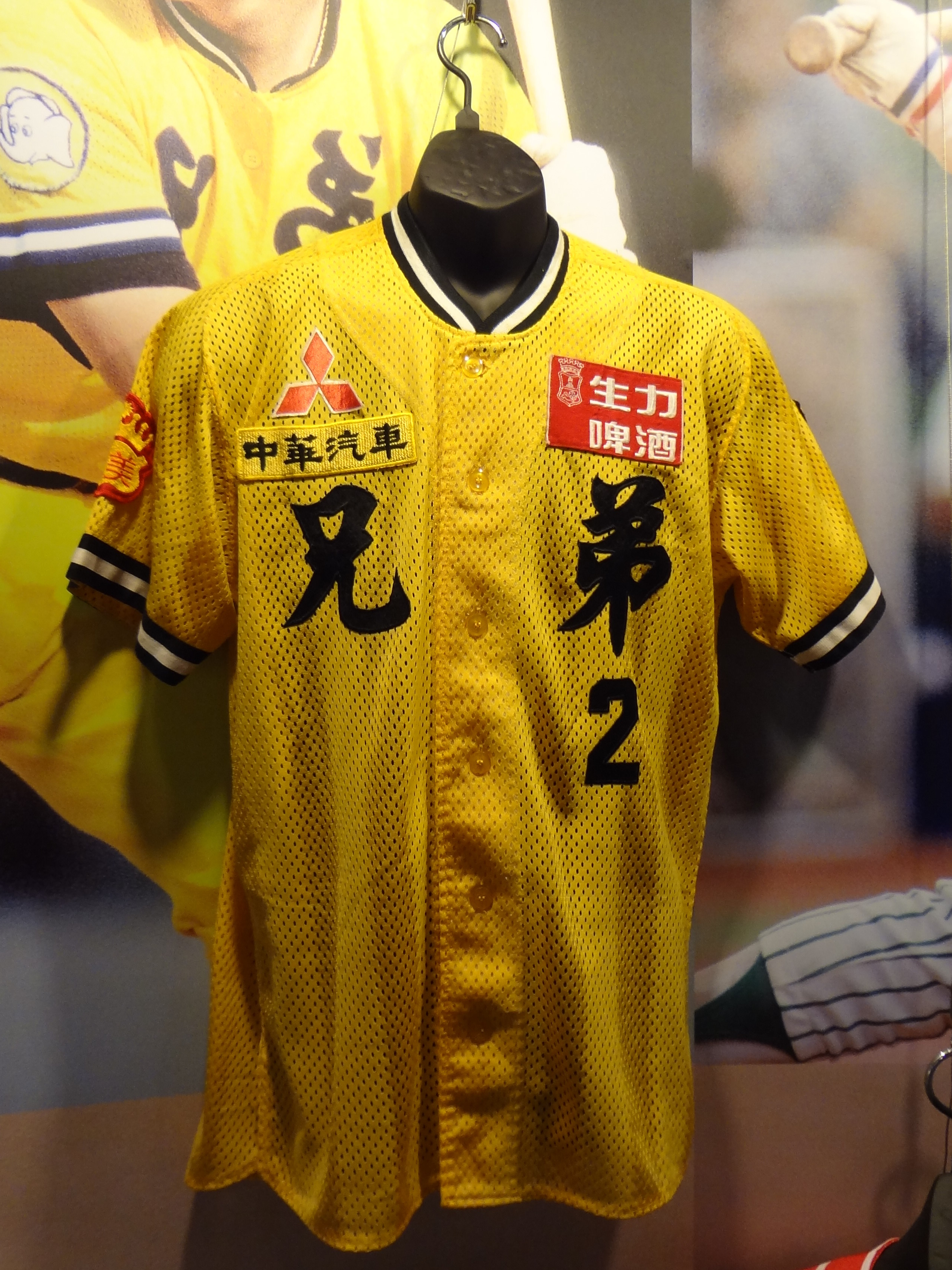 松山文化創意園區「金鐘五十．響」特別展展示品：中華職棒創始球隊兄弟象球衣。右胸繡三菱汽車商標加中華汽車標準字，左胸繡生力啤酒商標。